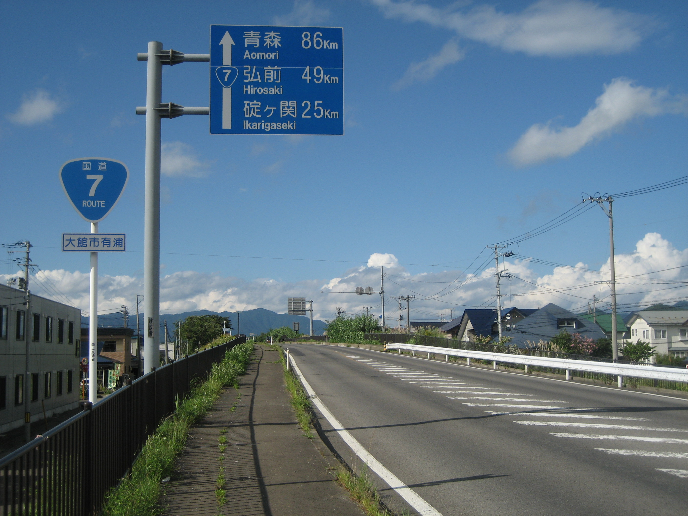 国道7号線秋田県大館市有浦（JR奥羽本線大館跨線橋付近）